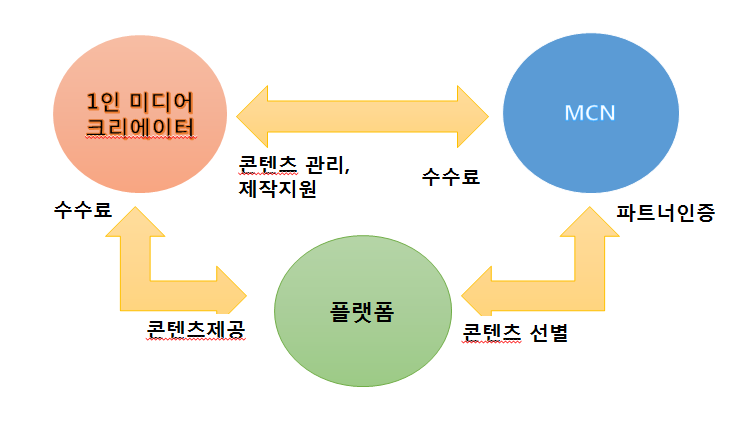 1인 미디어가 발달하면서 그들을 지지해주는 기업들이 등장했고 시장산업이 변화했다.